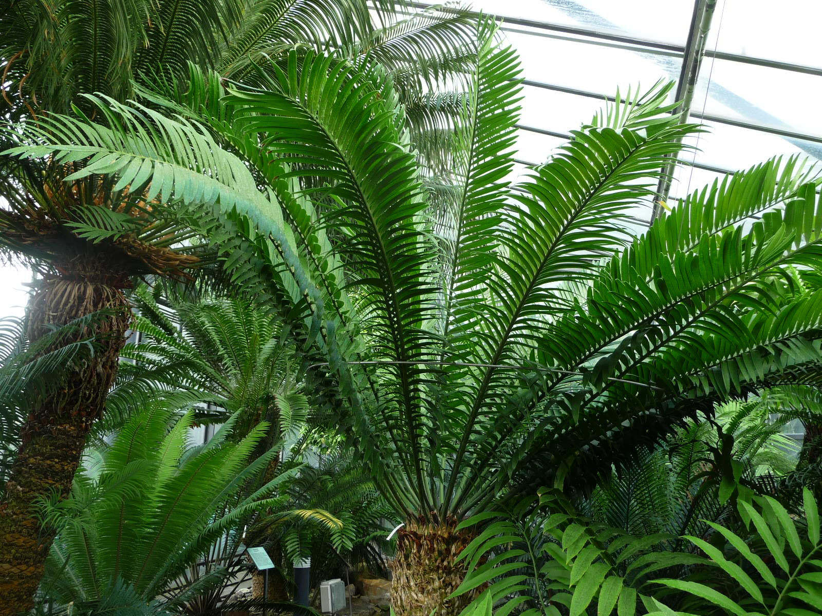 Encephalartos cf. natalensis (Hamburgi pálmaház)